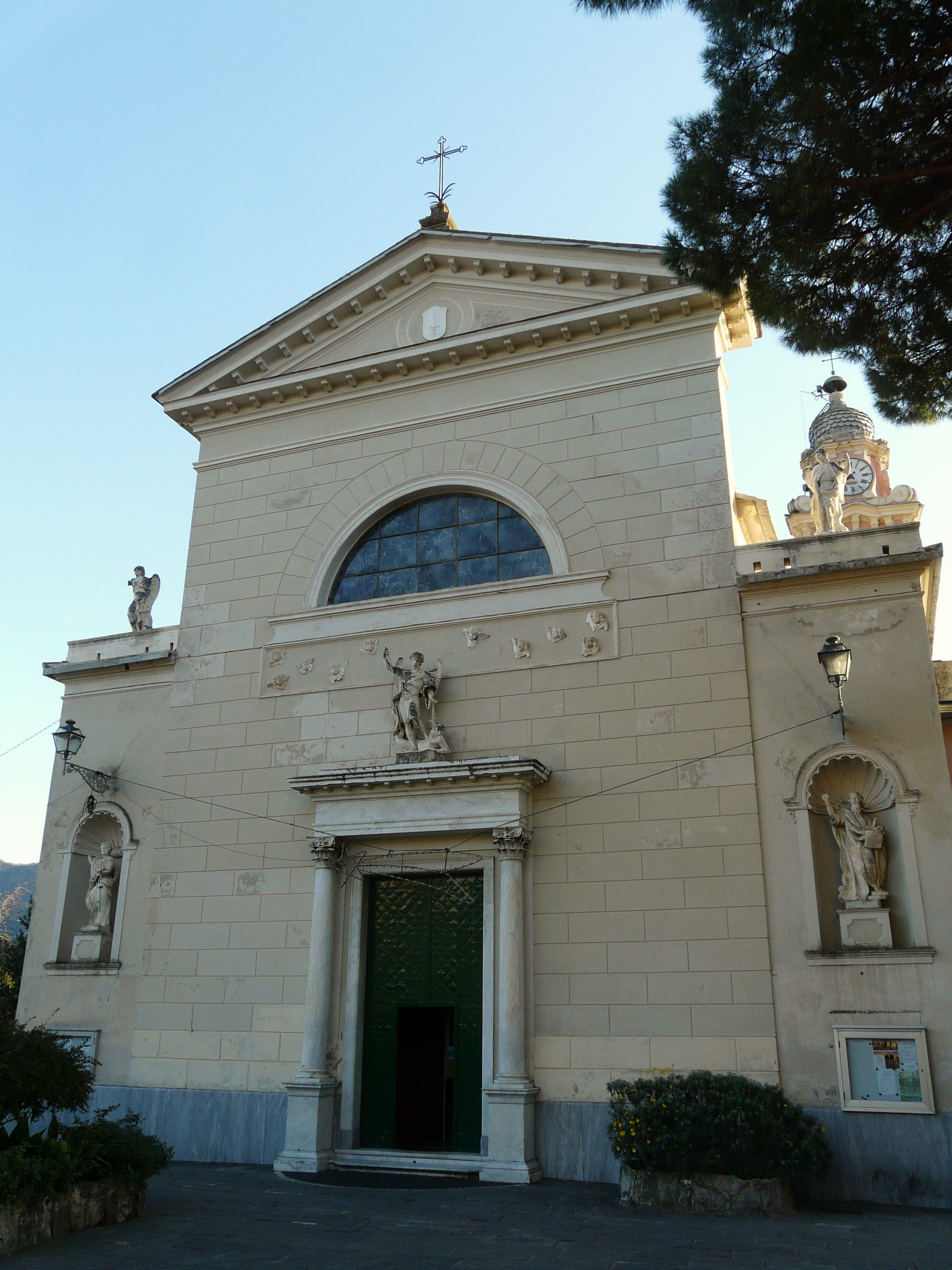 Chiesa di San Michele Arcangelo, San Michele di Pagana, Rapallo, Liguria, Italia